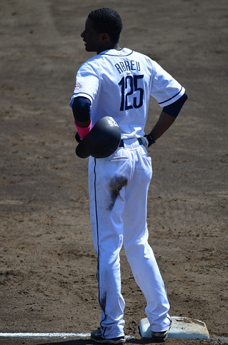 アブナー・アブレイユ